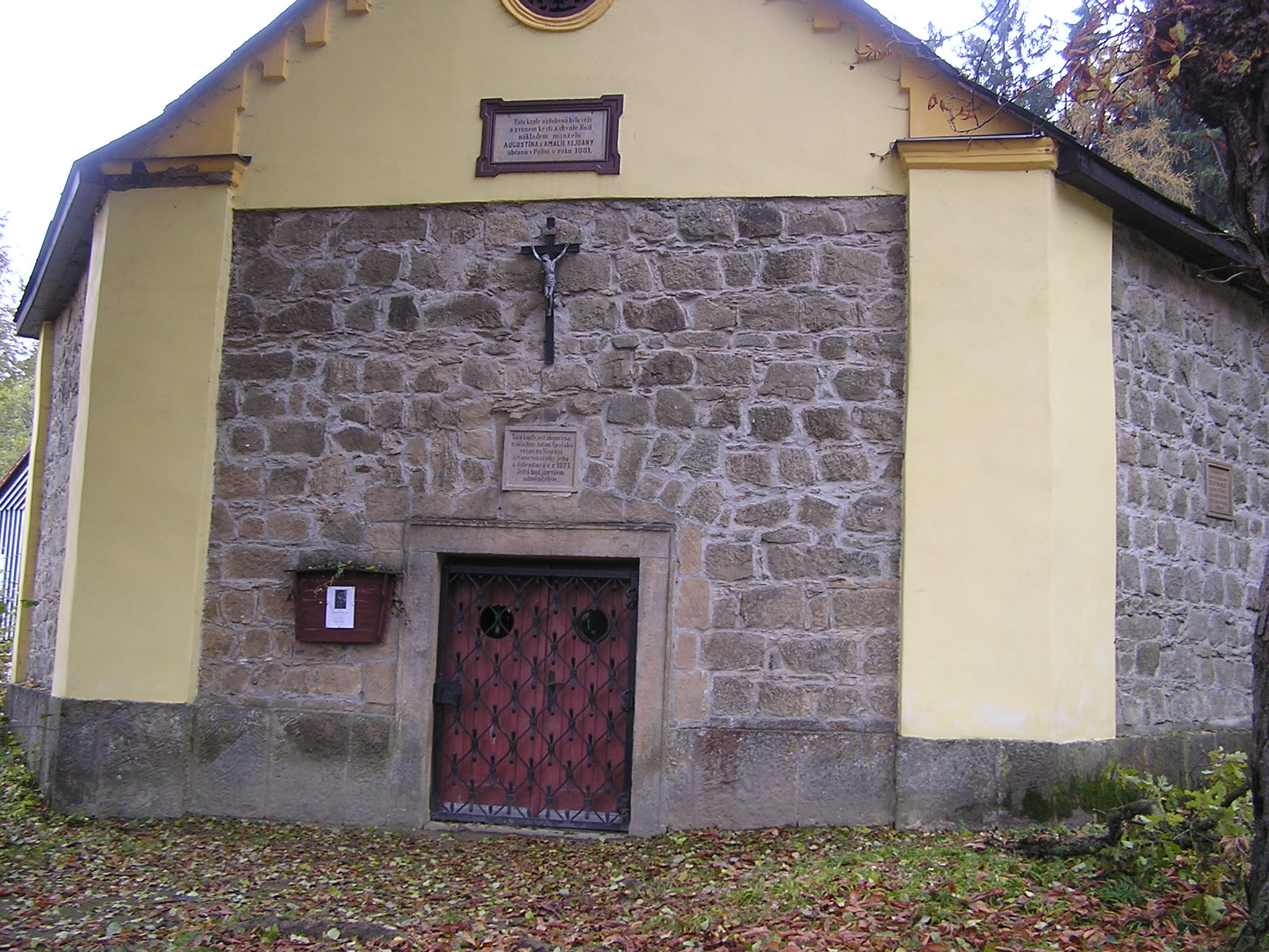 Kaple sv. Kříže (Žďár nad Metují), Ostaš, Žďár nad Metují